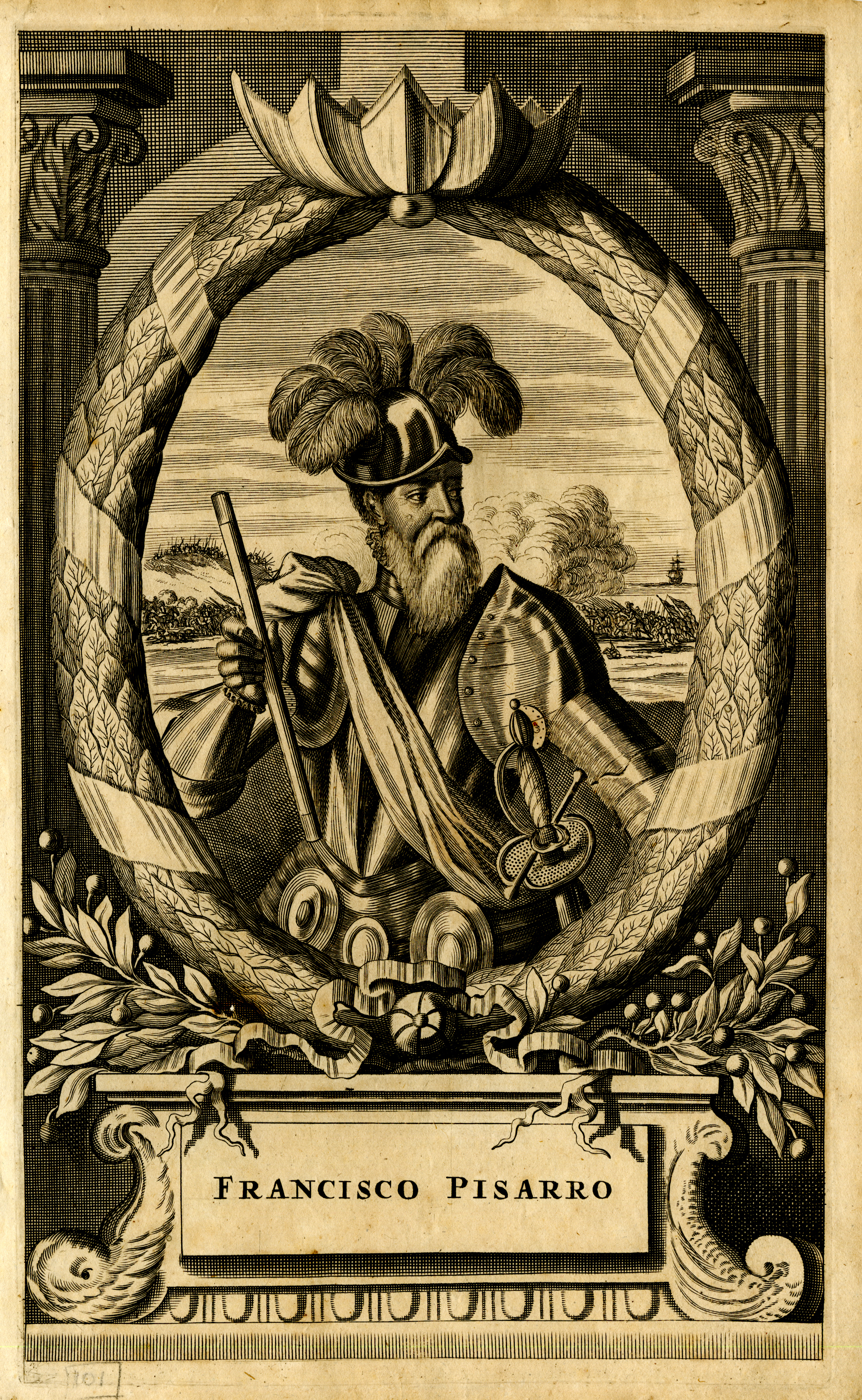 Diapositiva de Consulta y acceso publico cuya información fue investigada de un libro y/o ejemplar de revisión custodiado en los Fondos Bibliográficos (Sección Siglo XVI o Etapa de la Conquista Españolal) del Archivo Histórico del Guayas; Guayaquil, Ecuador.Consultado y compartido por el usuario J. Javier García A.